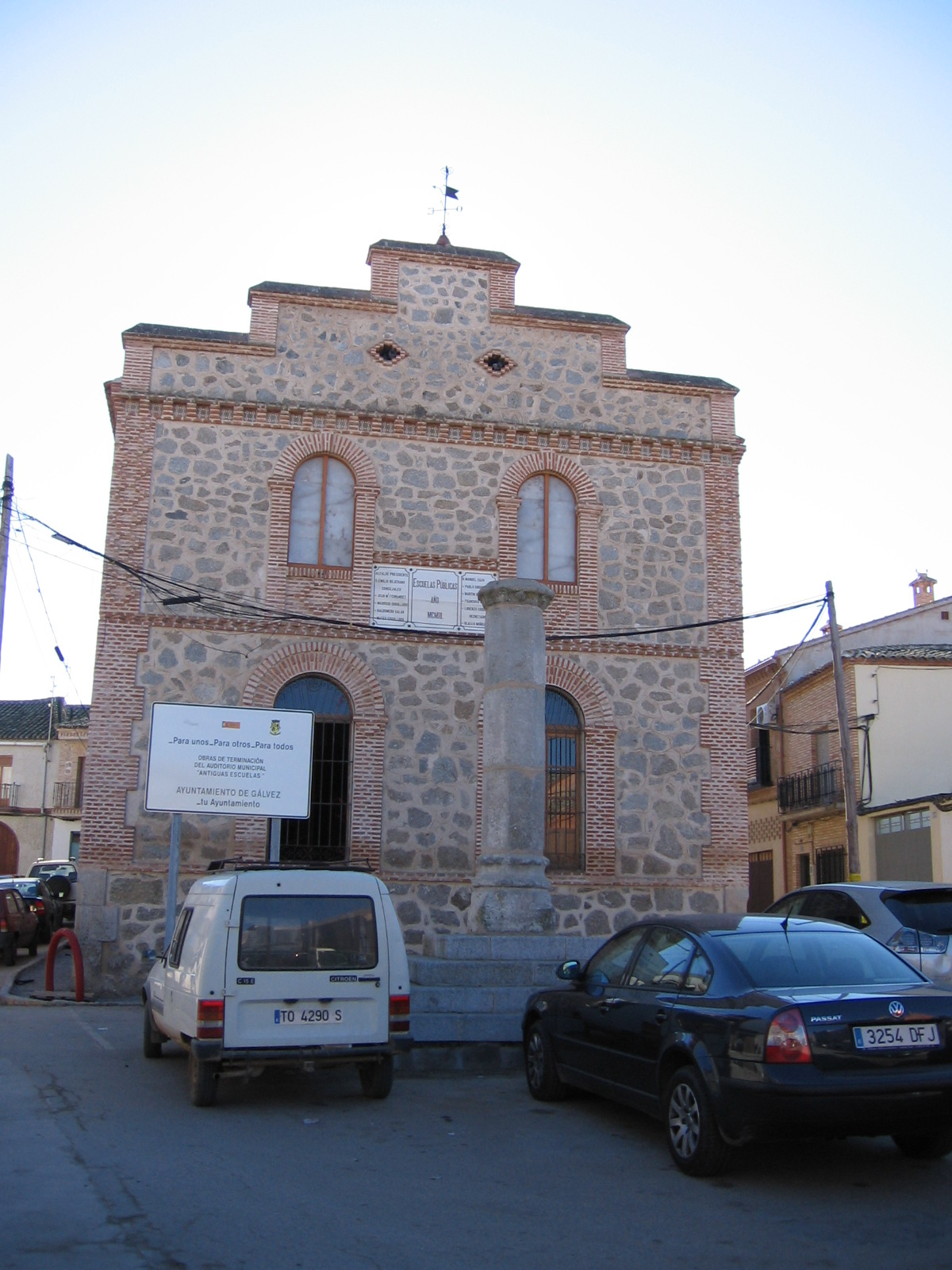 Antiguas escuelas de Gálvez (Toledo)